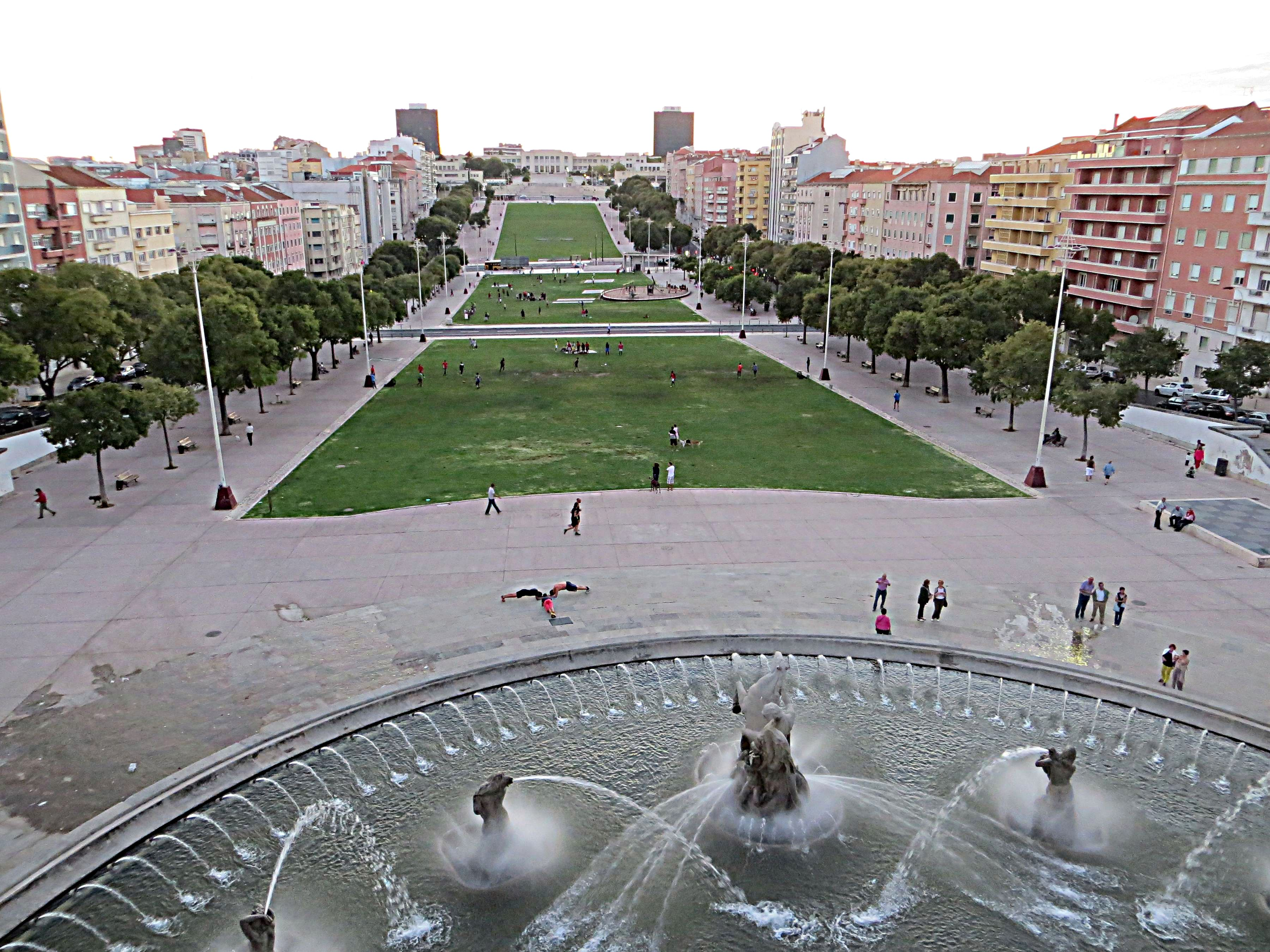 Fontana Liminosa